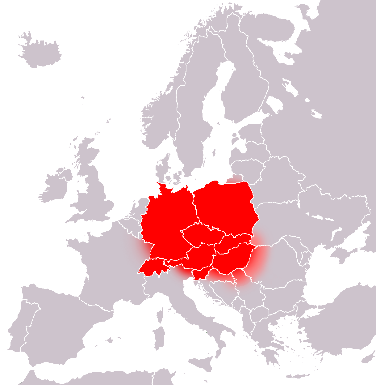 Made from Image:Central Europe (proposal 2).PNG